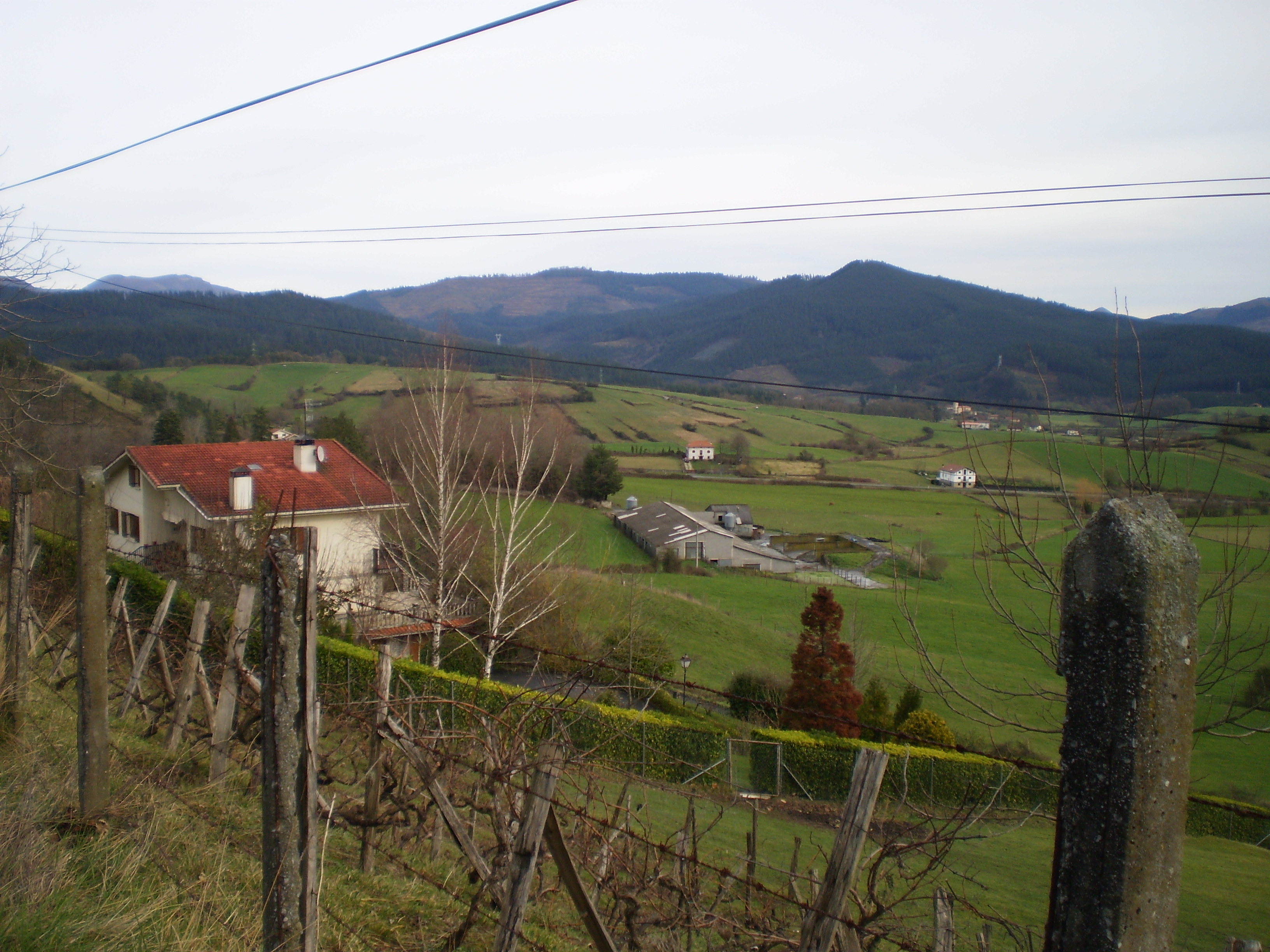 Ayala/Aiara, Álava, Spain